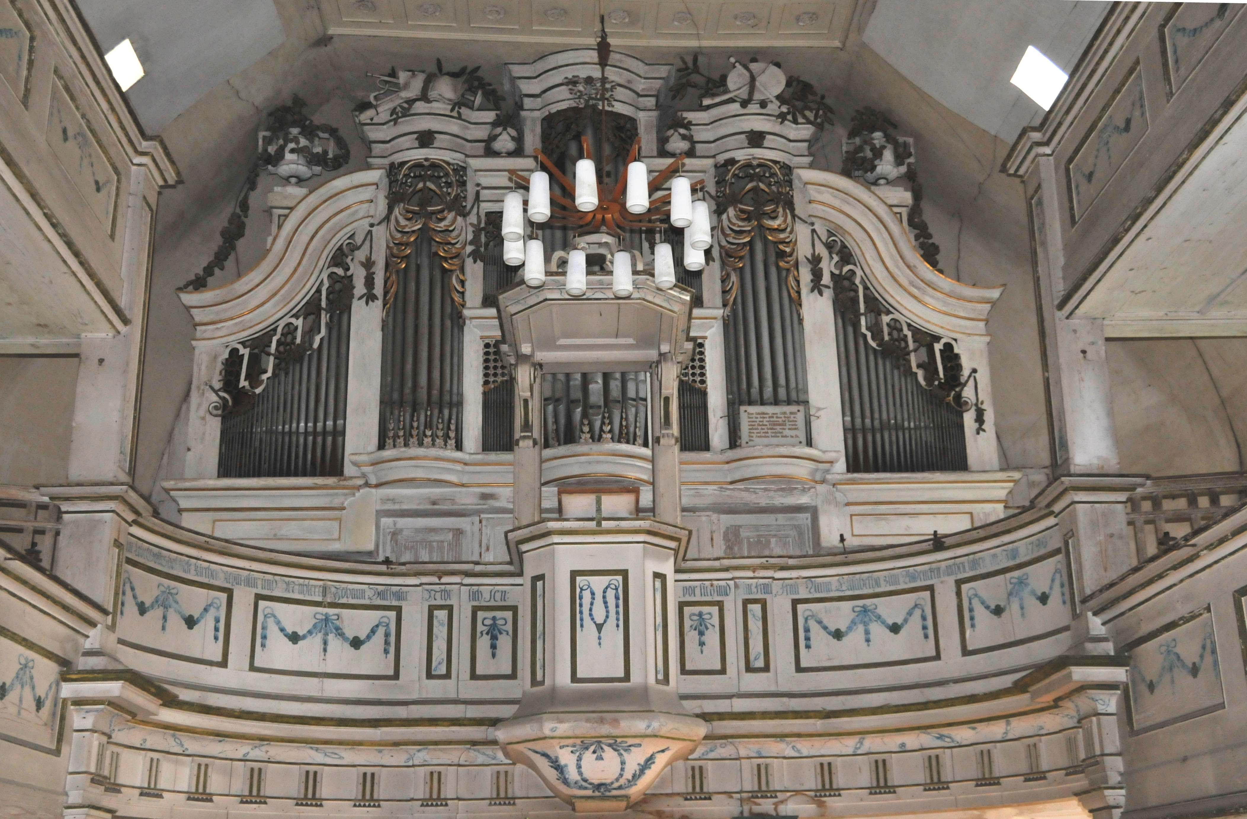 Gamstädt, Kirchenorgel